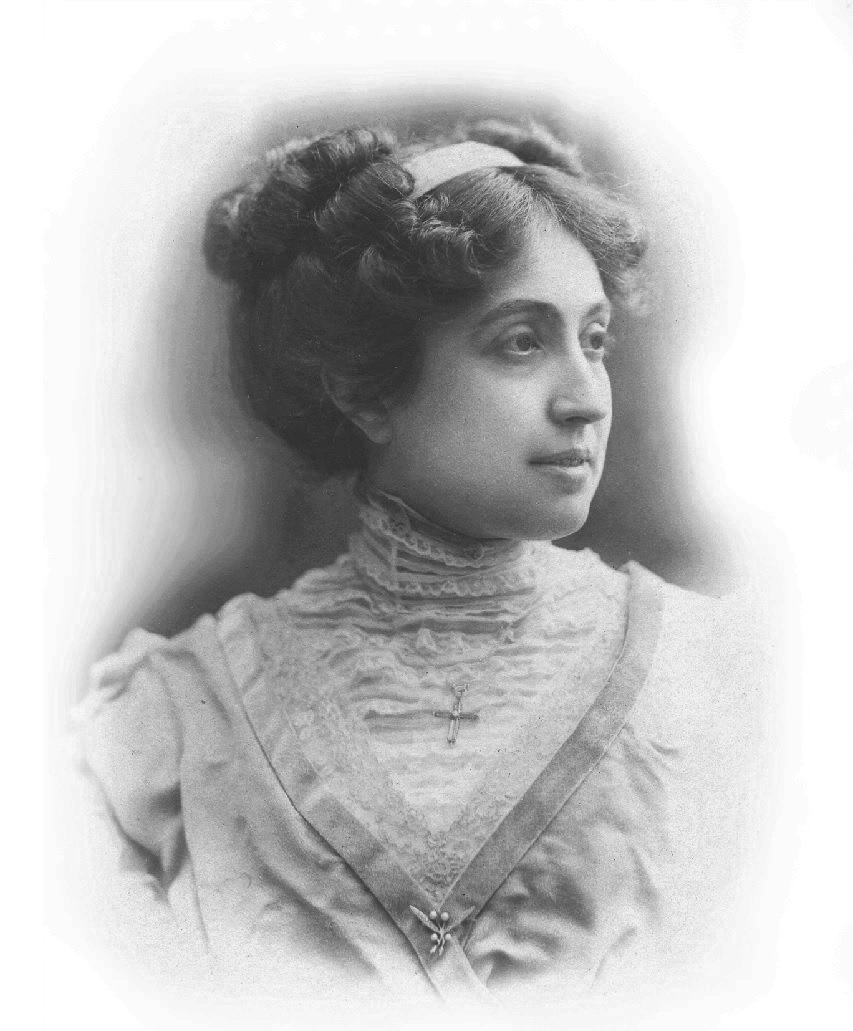 María del Adalid